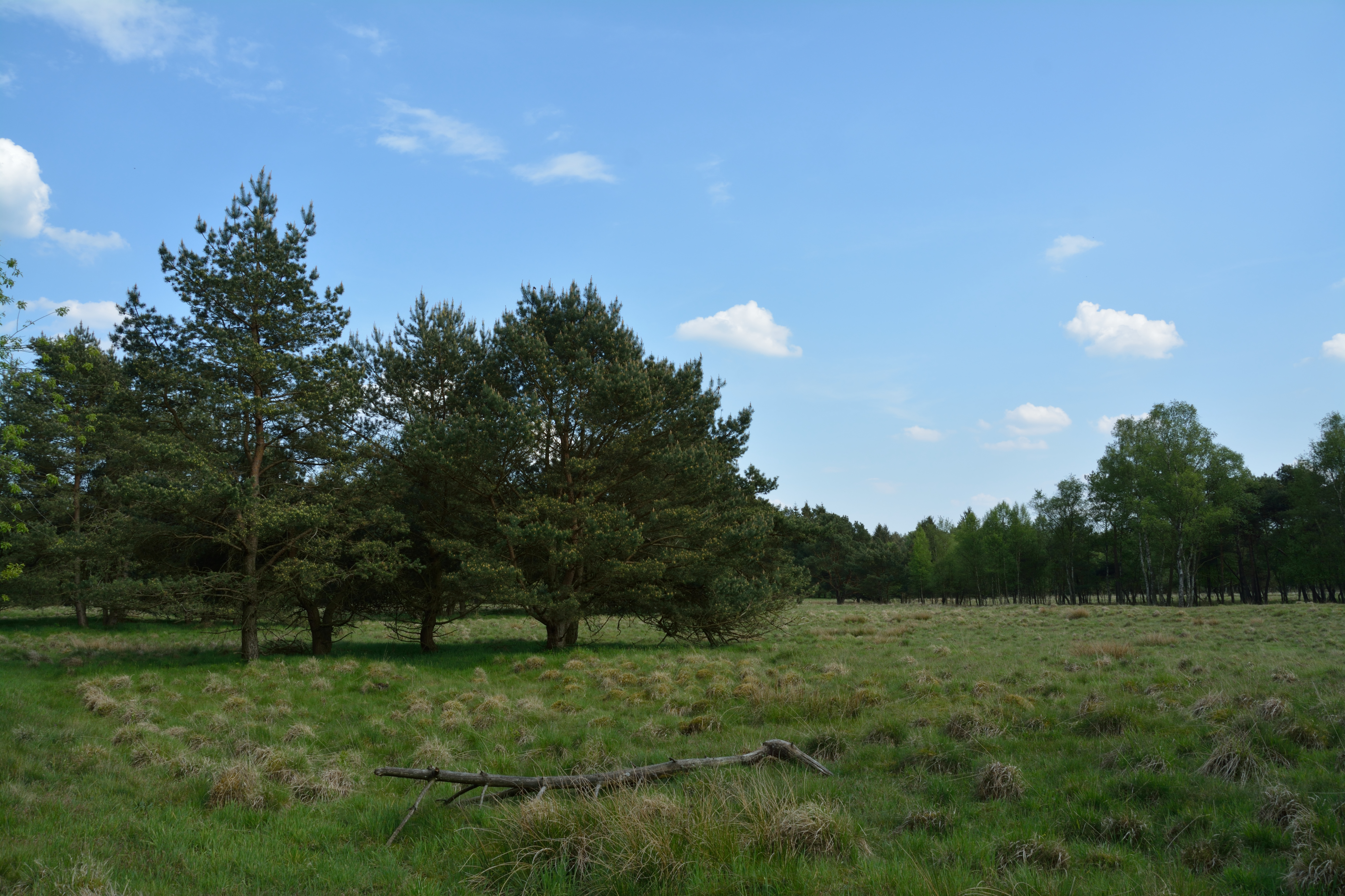 Impressionen aus dem Naturschutzgebiet "Stellbrookmoor" im Kreis Segeberg, Schleswig-Holstein